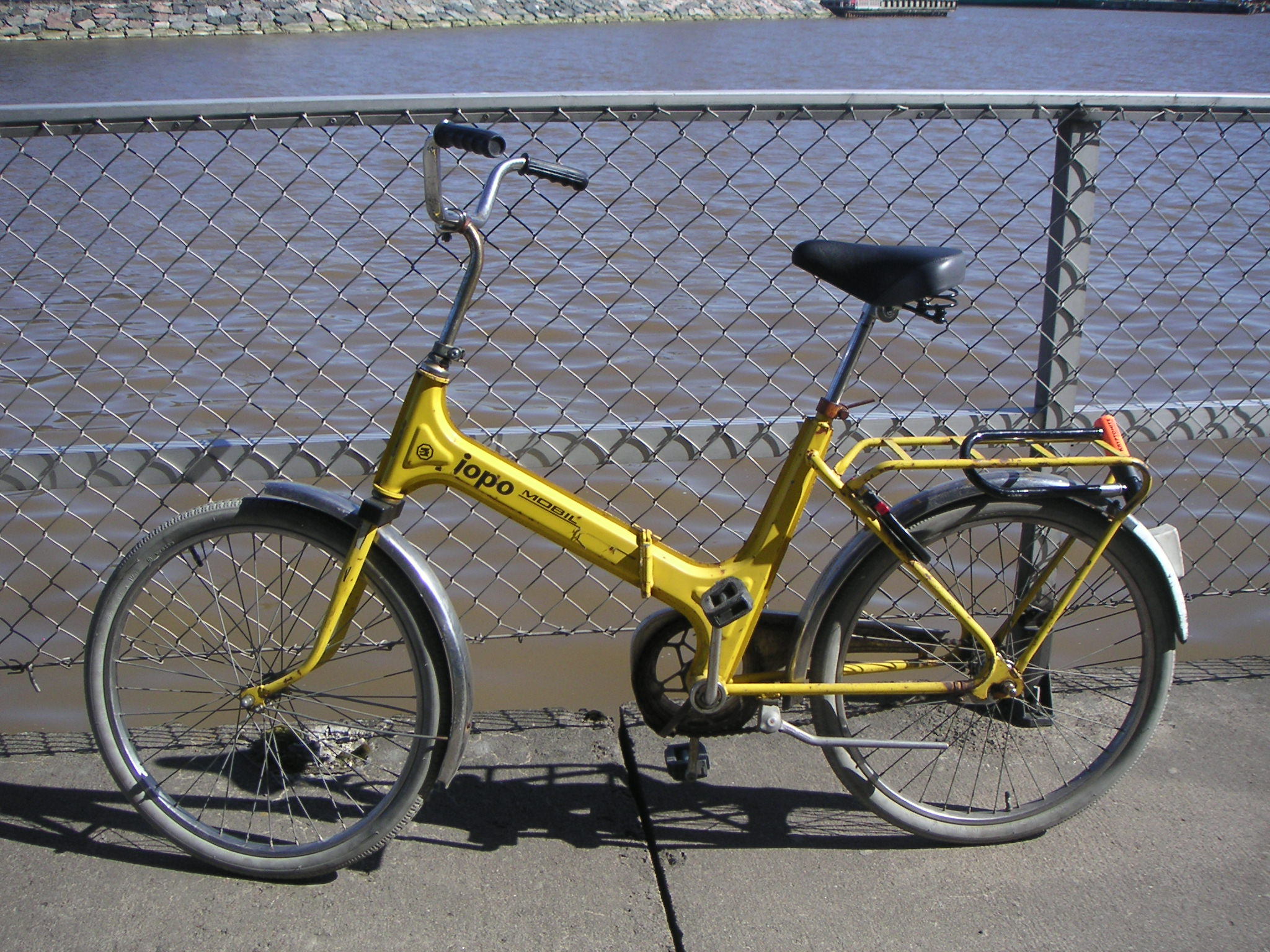 Un vélo Jopo Mobil